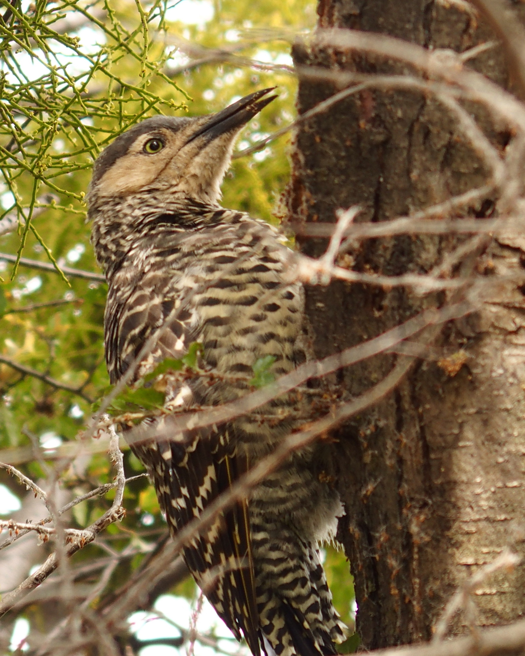 Bänderspecht (Colaptes pitius)